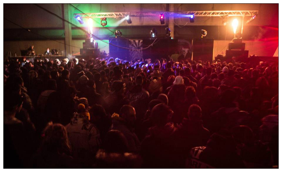 Free party nord italy